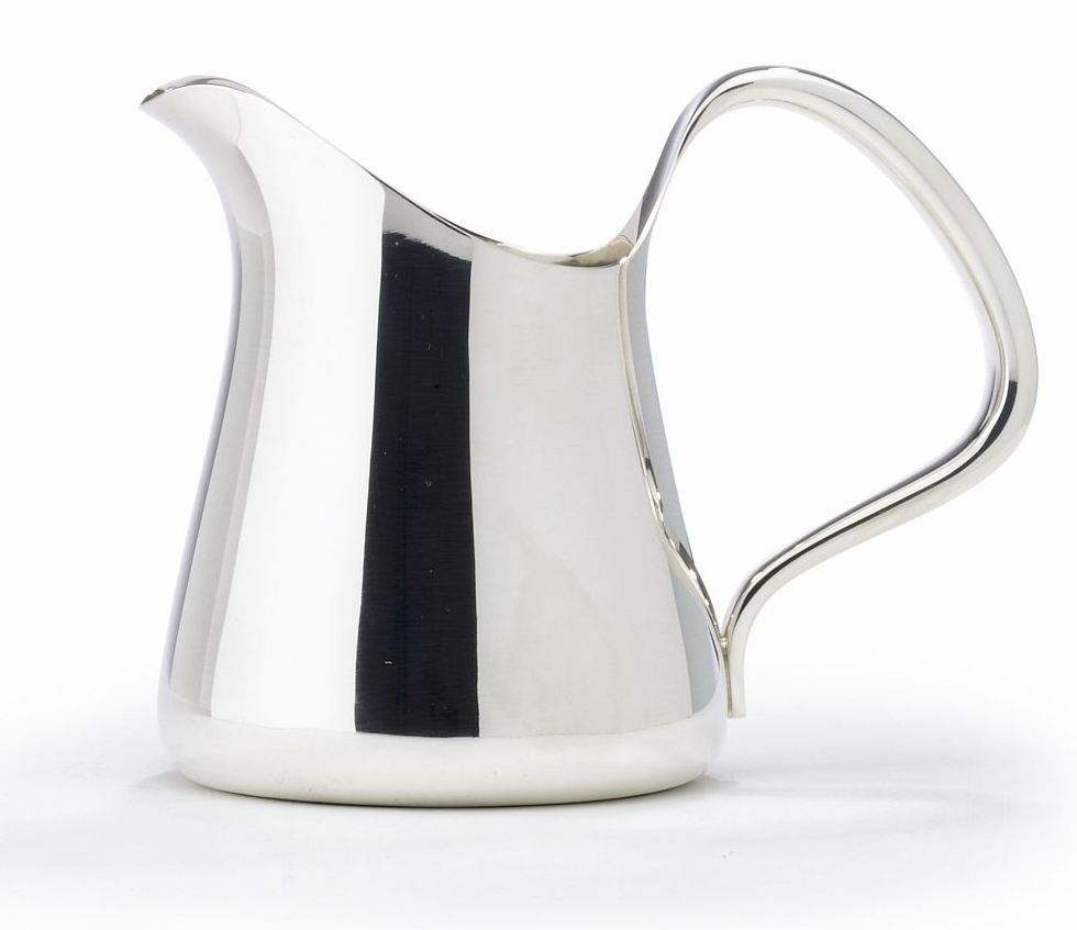 henning koppel-designed Georg Jensen milk jug